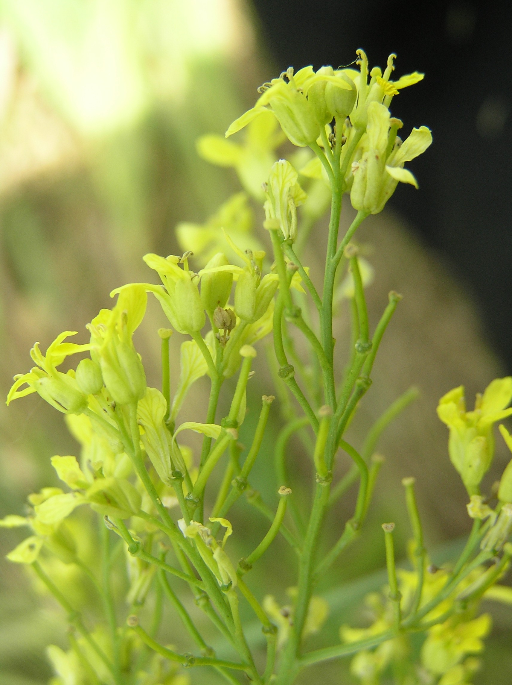 Sisymbrium volgense, Brno - Židenice, Czech Republic